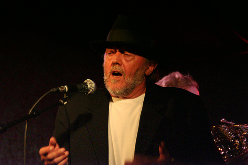 Povl Dissing